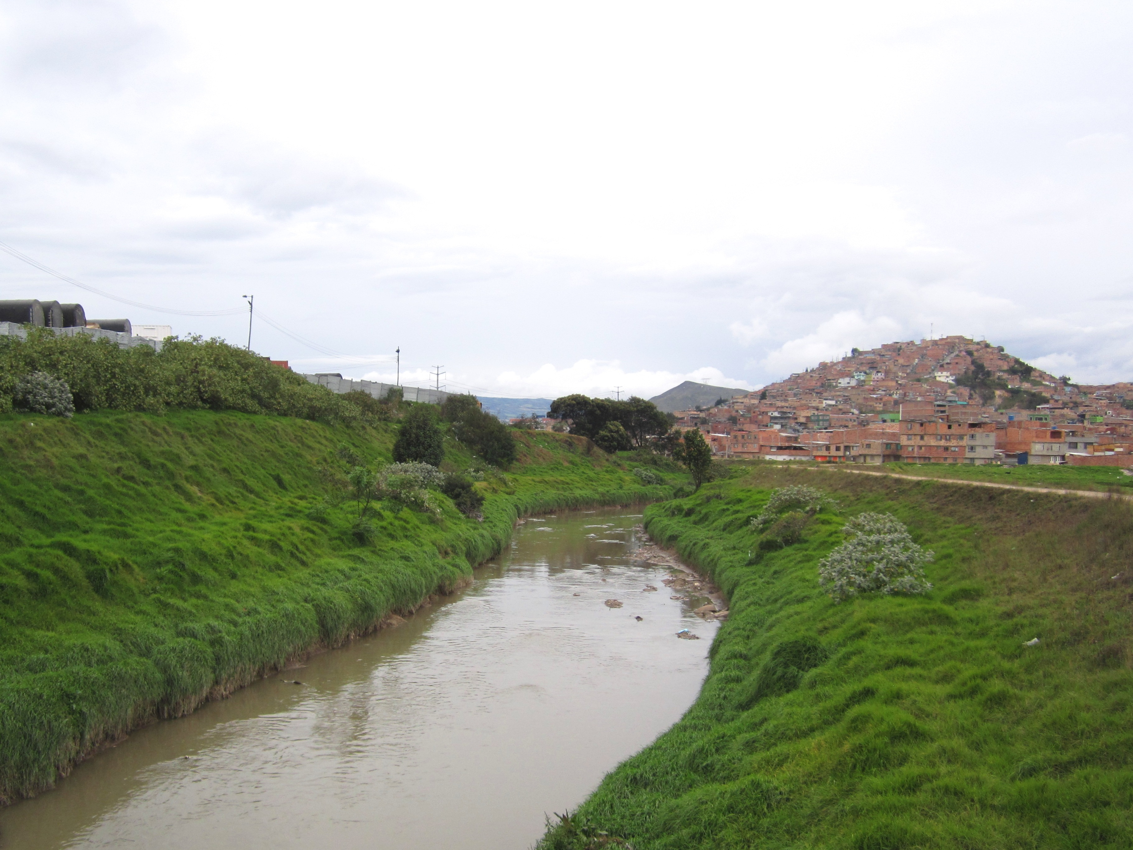 Ciudad Bolívar, río Tunjuelo, transversal 20 B con calle 61 S. Barrio Ronda. Sur de Bogotá.